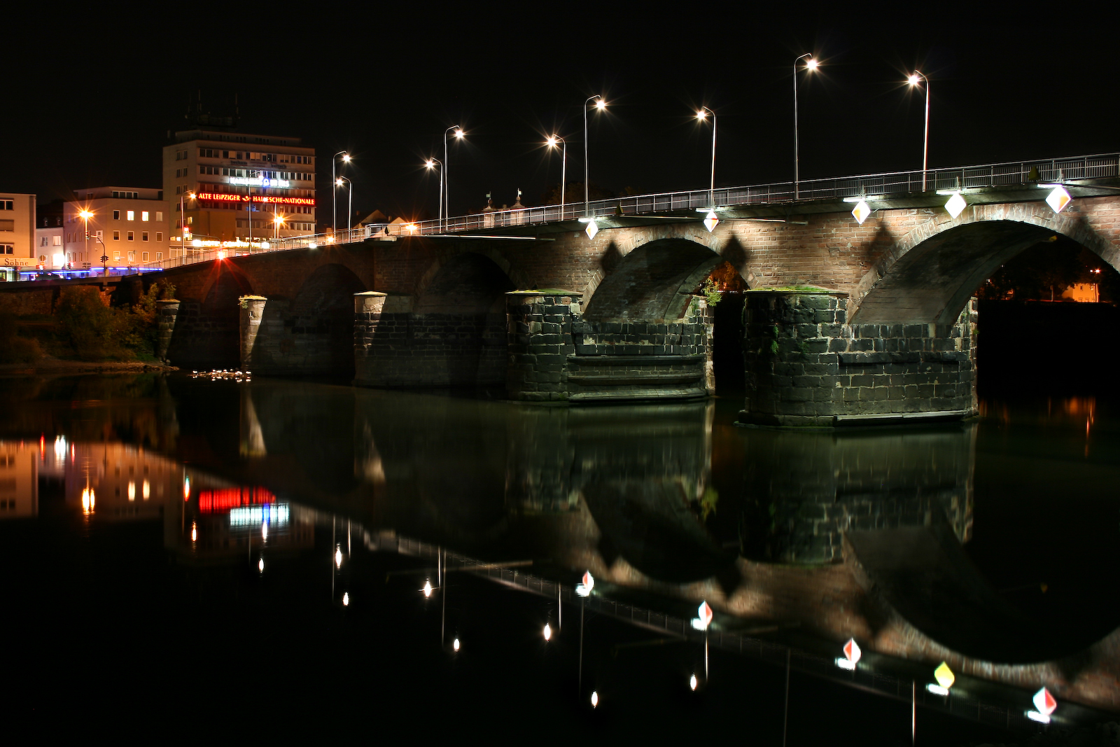 Roman bridge in Trier at night